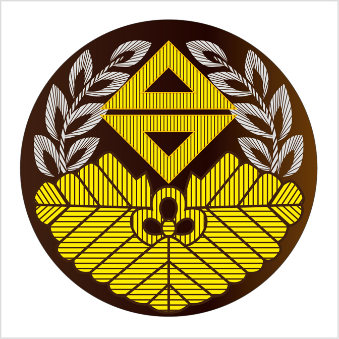 臺灣總督府文官新式帽章，刺繡形。Redraw Government-General of Taiwan Gazette.